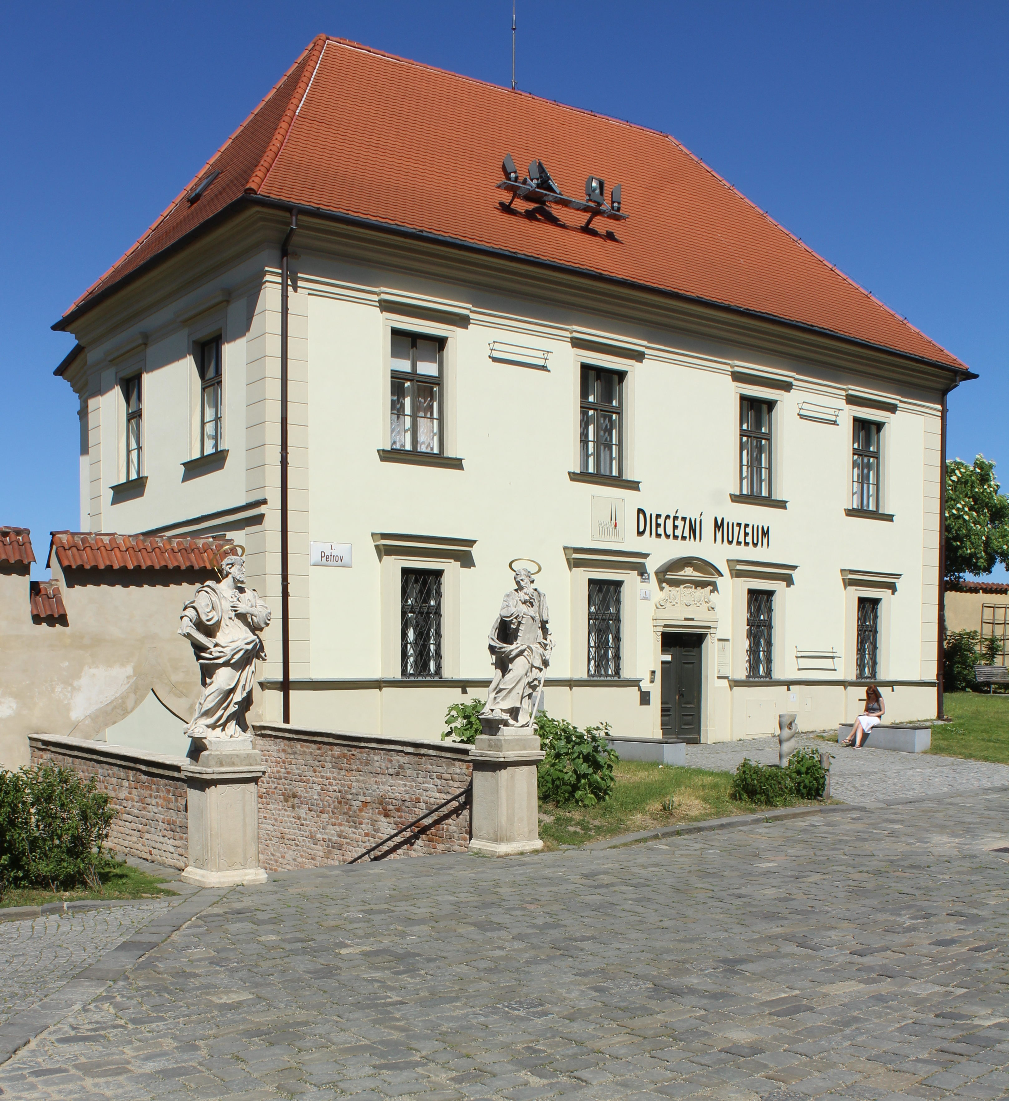 Diocesan museum in Brno, main wing of former Dean´s pallais of The Royal Chapter